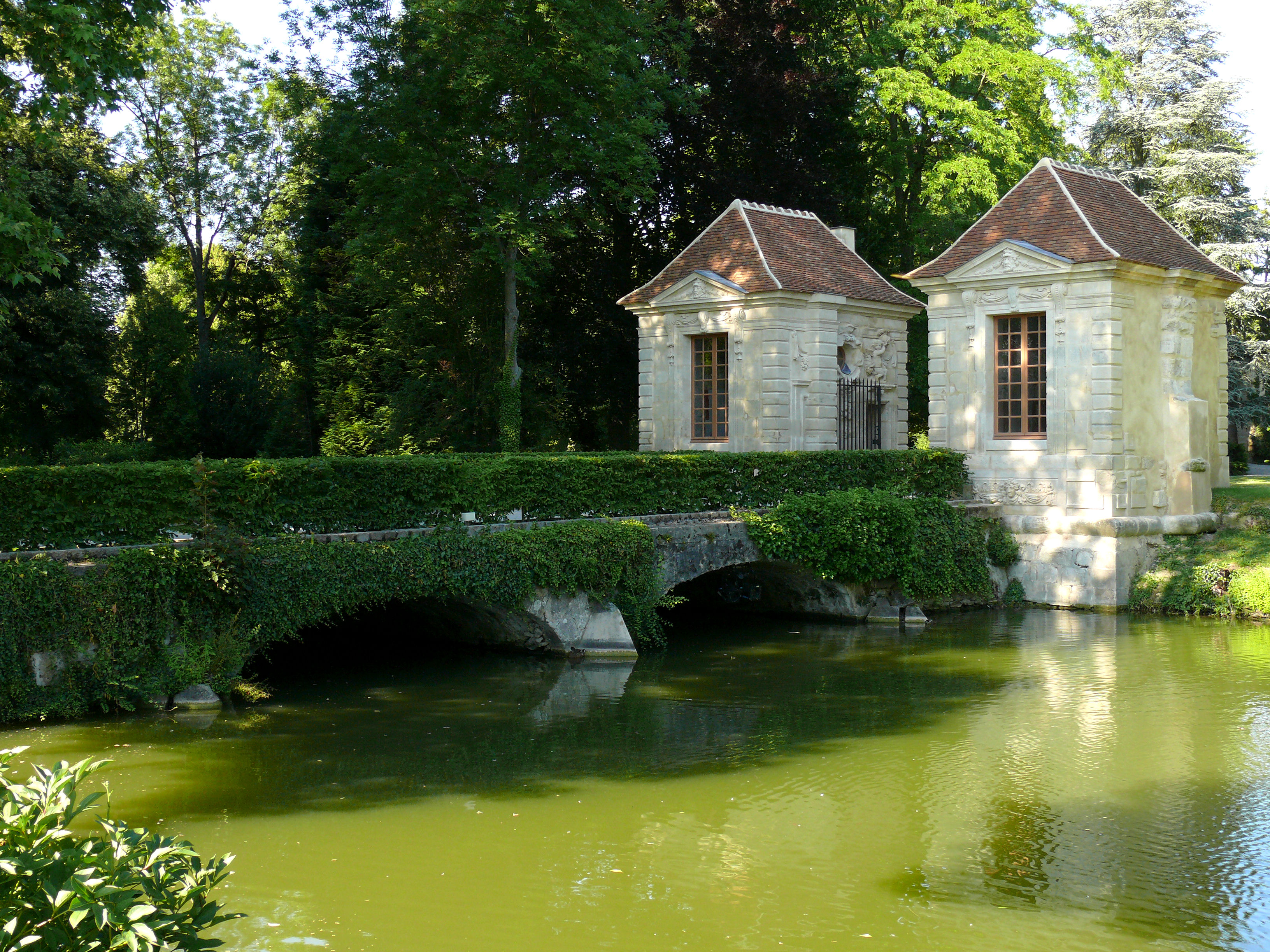 Coulommiers - Parc des Capucins - Ancienne entrée du château, pavillons des gardes de François Mansart